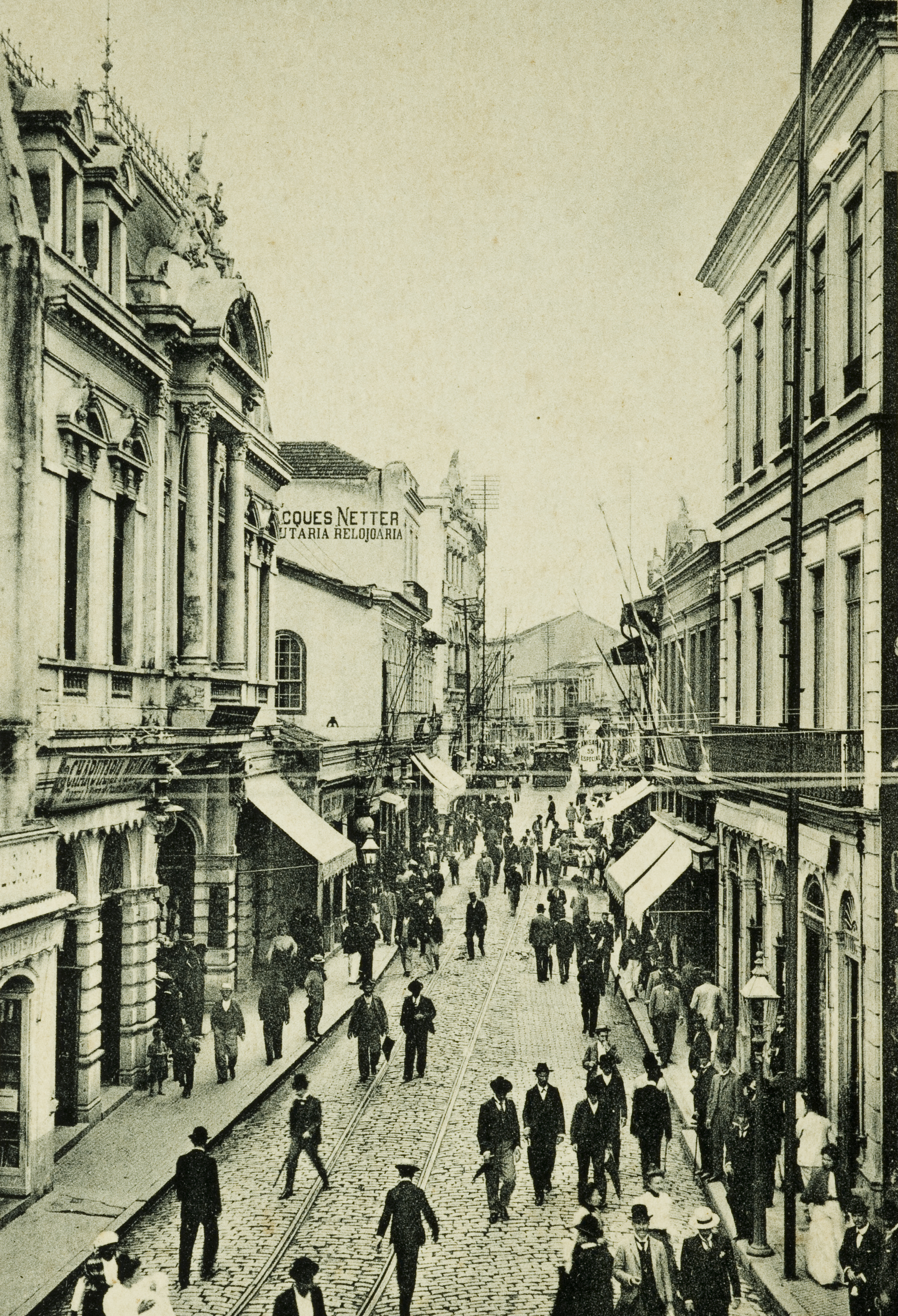 Obra que integra o acervo do Museu Paulista da USP.